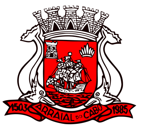 Brasão de armas do município de Arraial do Cabo, no estado do Rio de Janeiro. Esta obra pertence ao domínio público, já que foi publicada por um órgão governamental antes de 1983. (Lei nº 3071/1916, art. 662; Lei nº 5988/1973, art. 46; Lei nº 9610/1998, art. 115)